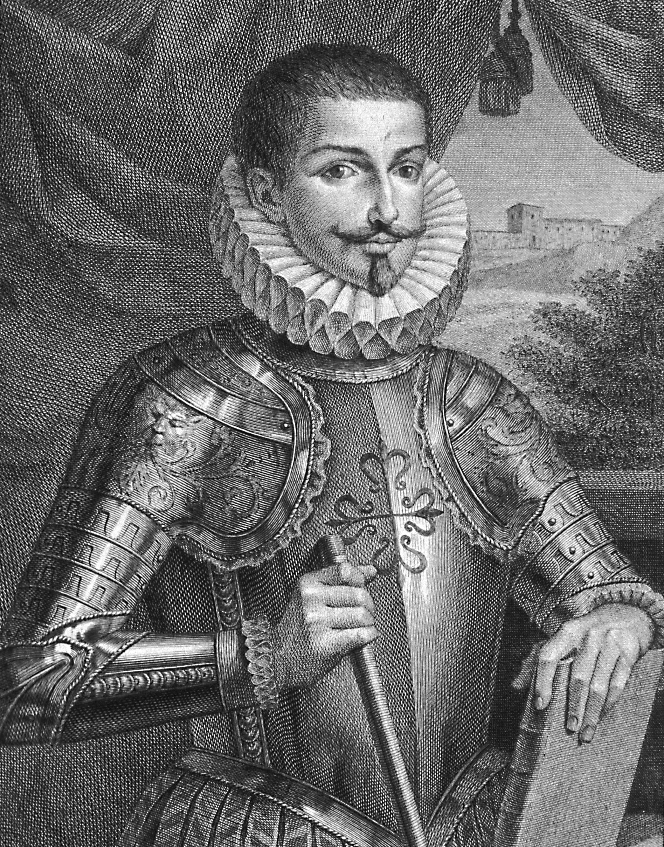 VII Conde de Lemos, Pedro Fernandez de Castro